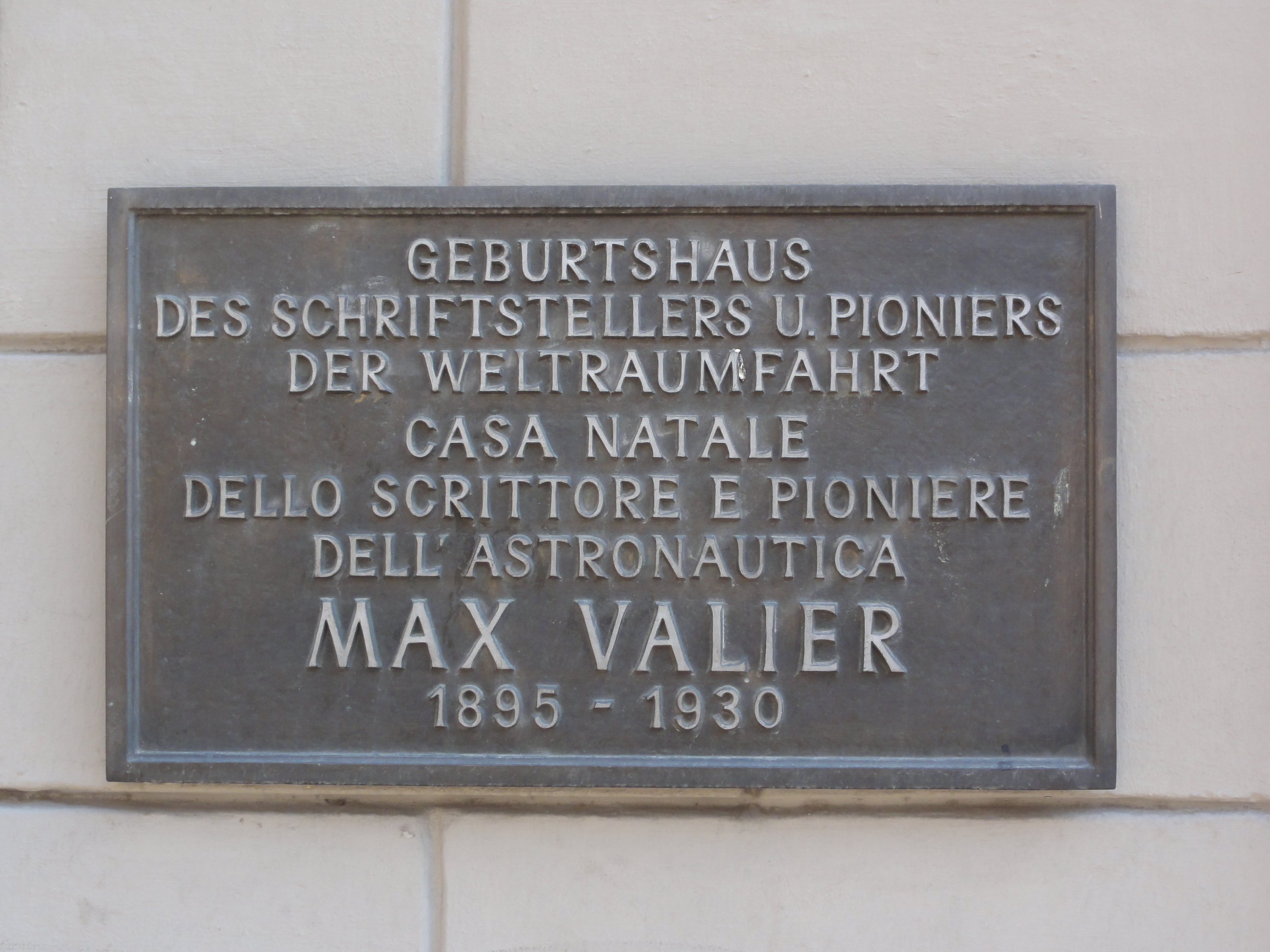 Bozen-Bolzano —